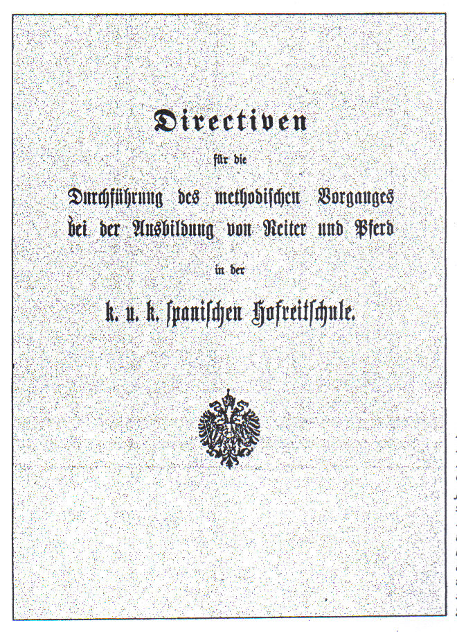 Kopie des Deckblattes der Directiven von 1898.